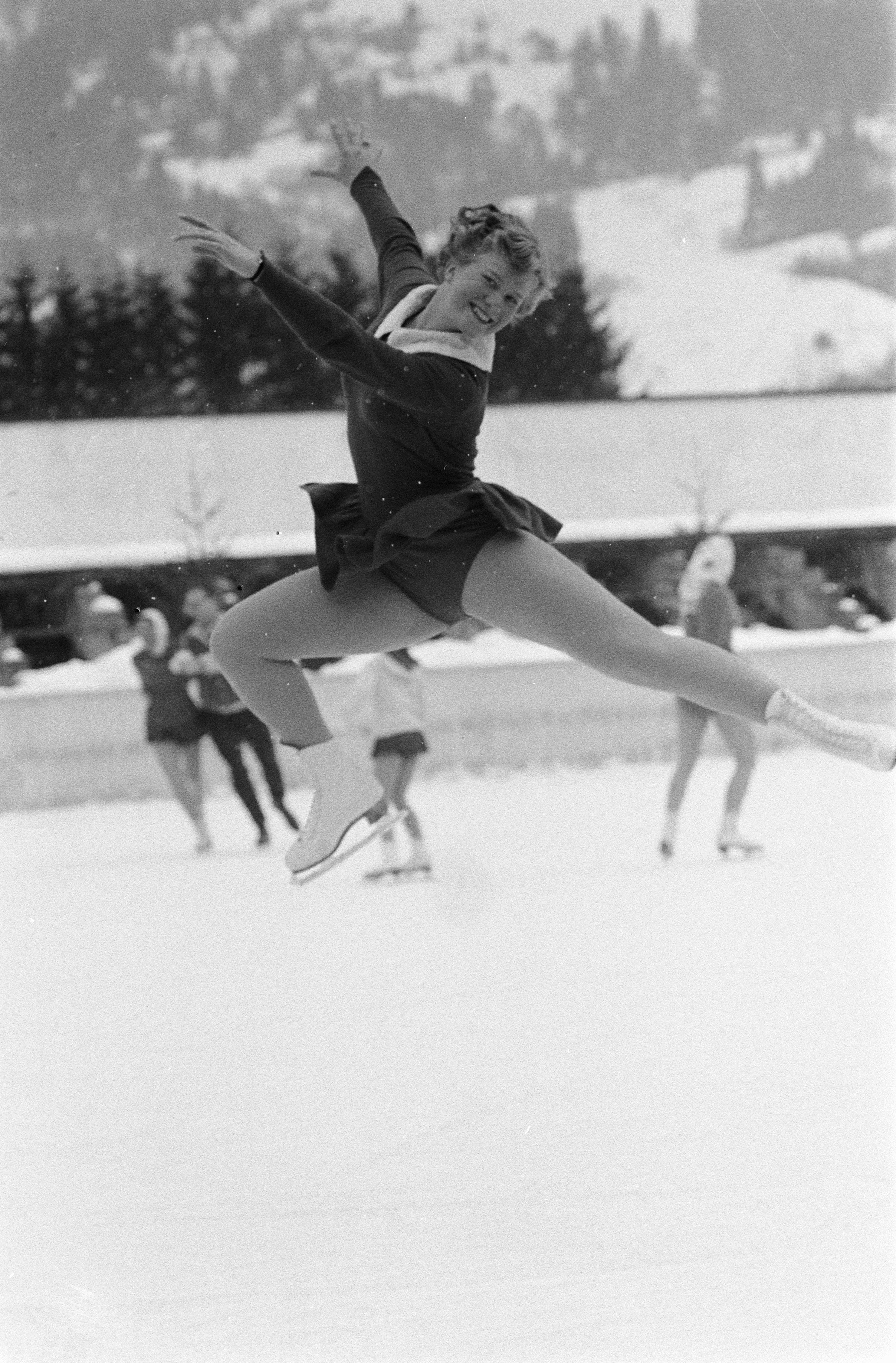 Collectie / Archief : Fotocollectie Anefo Reportage / Serie : [ onbekend ] Beschrijving : Europese schaatskampioenschap schoonrijden te Garmisch, Sjoukje Dijkstra Datum : 3 februari 1960 Locatie : Garmisch Trefwoorden : kunstrijdsters, schaatskampioenschappen Persoonsnaam : Dijkstra, Sjoukje Fotograaf : Pot, Harry / Anefo Auteursrechthebbende : Nationaal Archief Materiaalsoort : Negatief (zwart/wit) Nummer archiefinventaris : bekijk toegang 2.24.01.05 Bestanddeelnummer : 910-9984